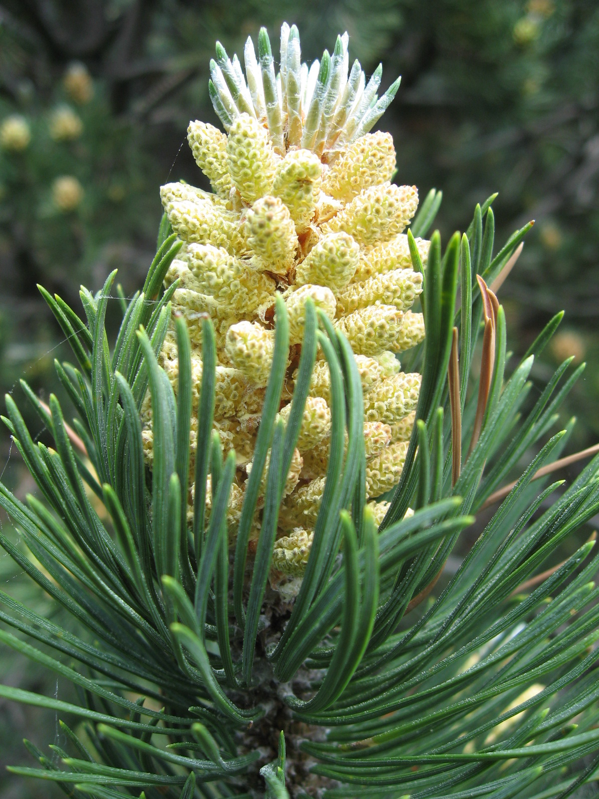 Pinus uncinata detall bosses pol·líniques